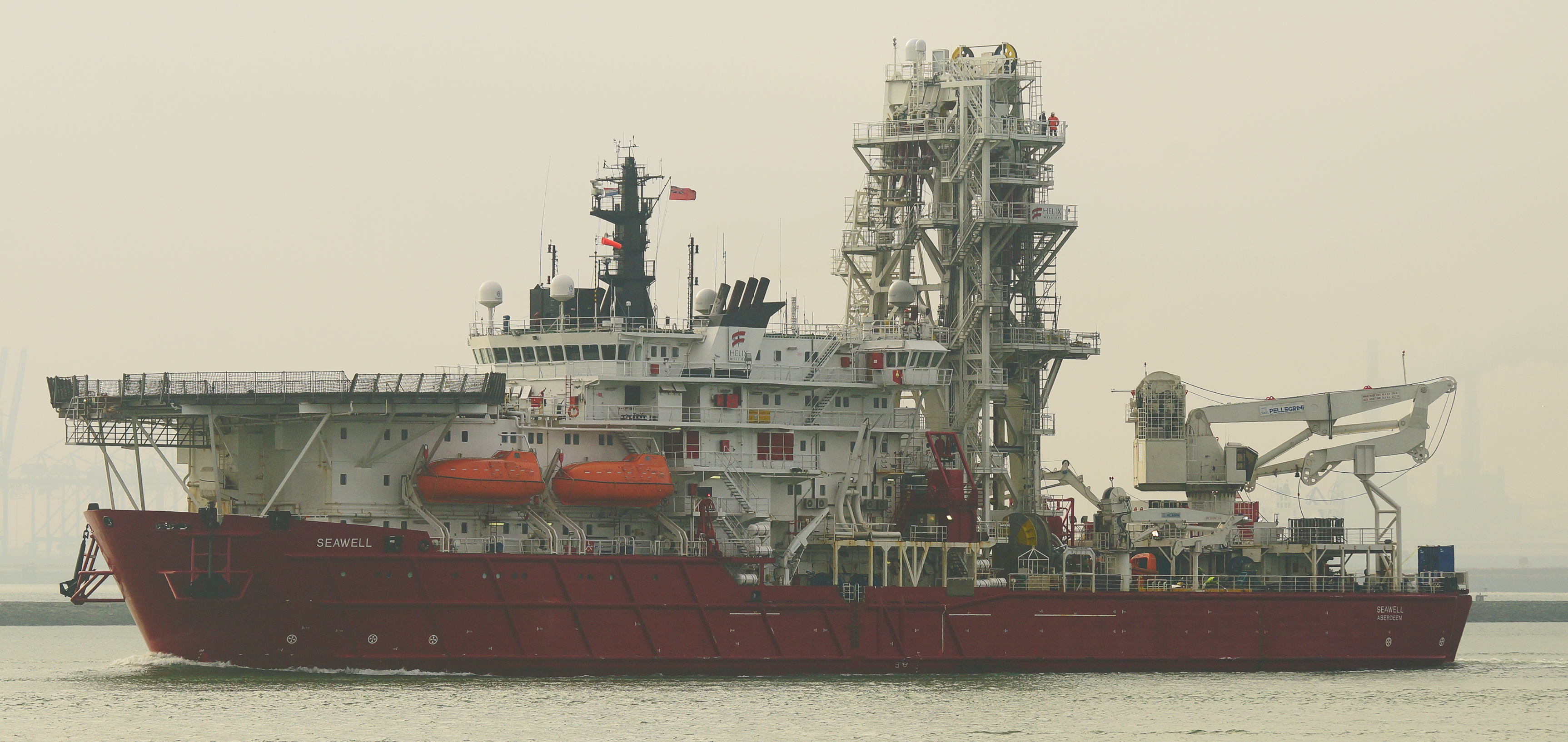 Nieuwe Waterweg 26-1-2017